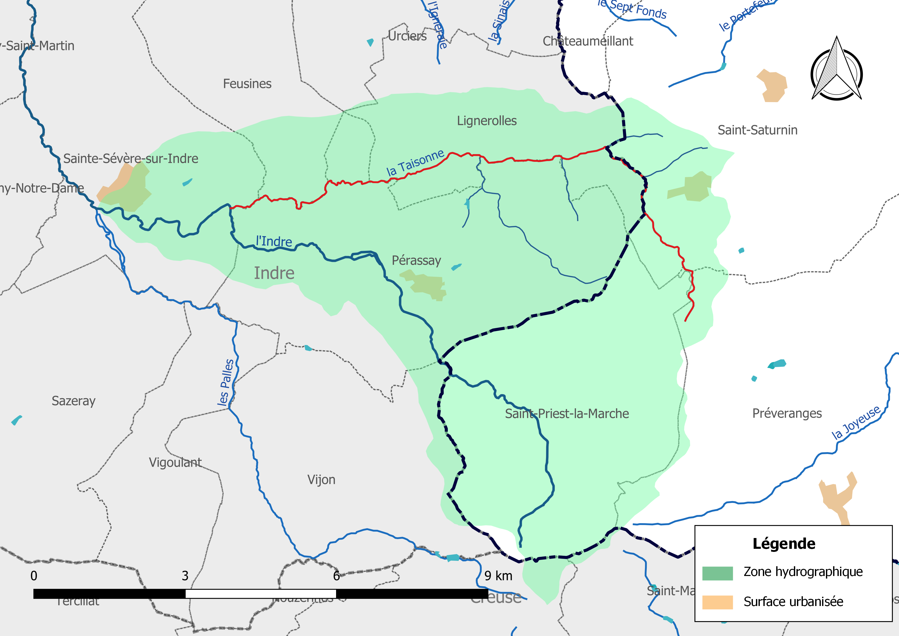 Carte du cours d'eau « la Taisonne » (France) et de la zone hydrographique dans laquelle il s'insère.